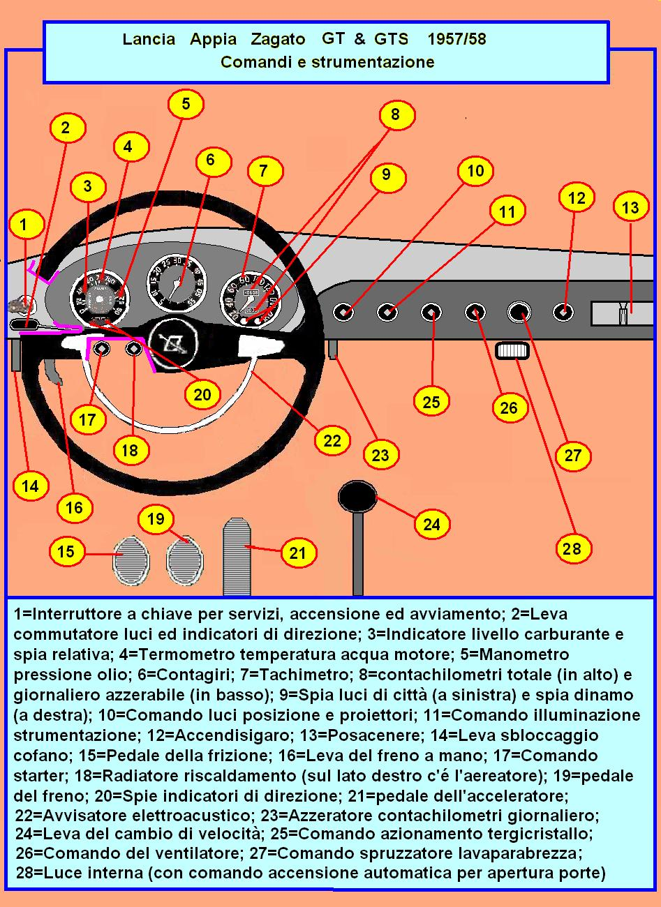 Immagine-disegno creata dal sottoscritto (Giomayo) utilizzando il programma "Paint" di Windows ed attingendo le necessarie informazioni dall'articolo pubblicato su Auto Italiana numero 8 del 1° luglio 1957 a pagina 11.